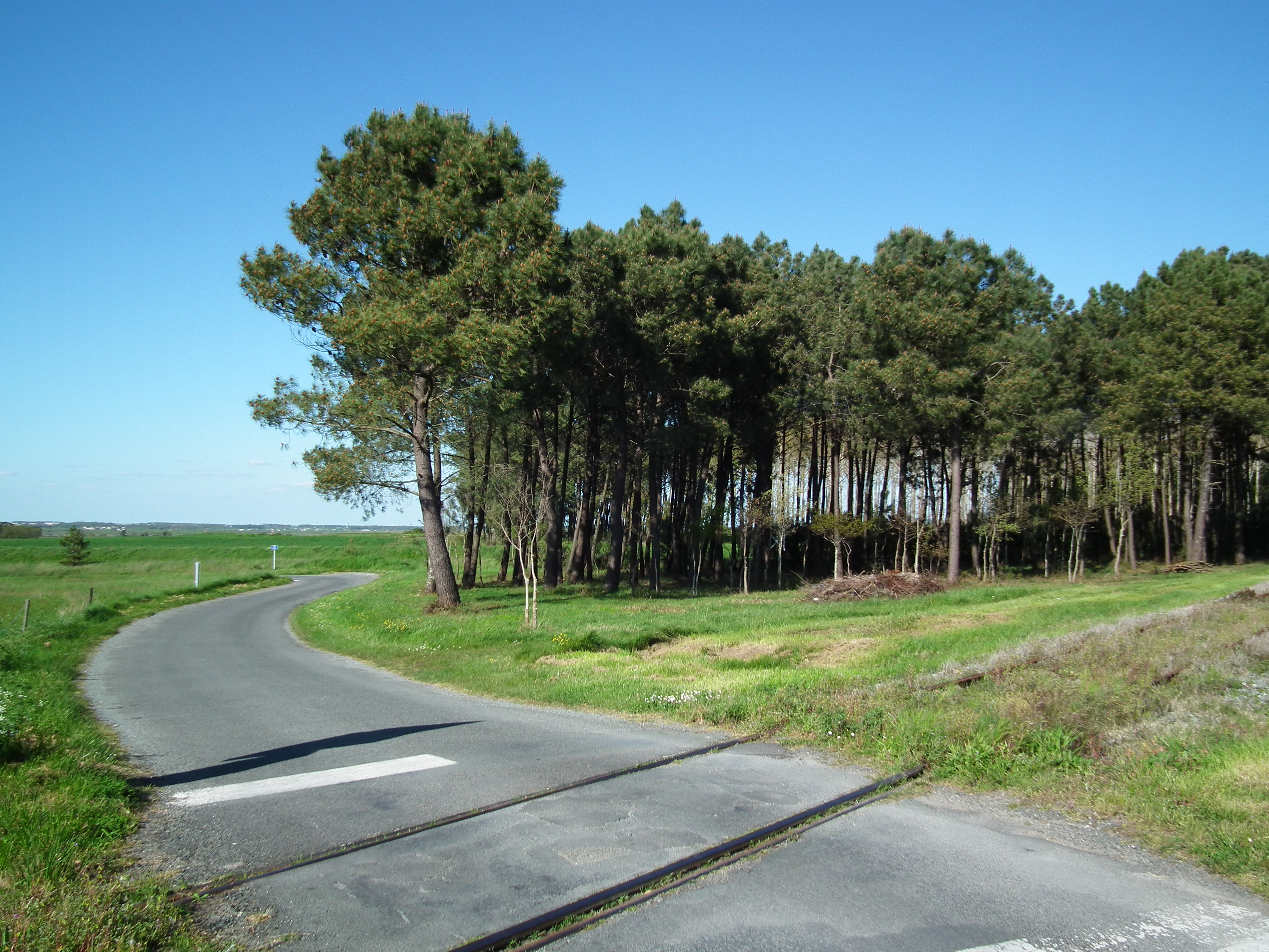 Bosquet de pins maritimes sur les crêtes d'Etaules (Charente-Maritime)